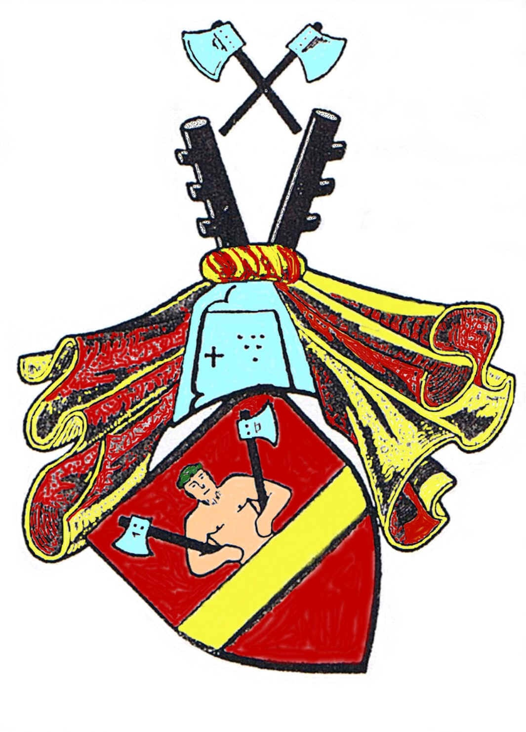 Das Wappen wurde ursprünglich vom Senator und Ratsherr Hugo Schuckmann in Lübeck geführt.